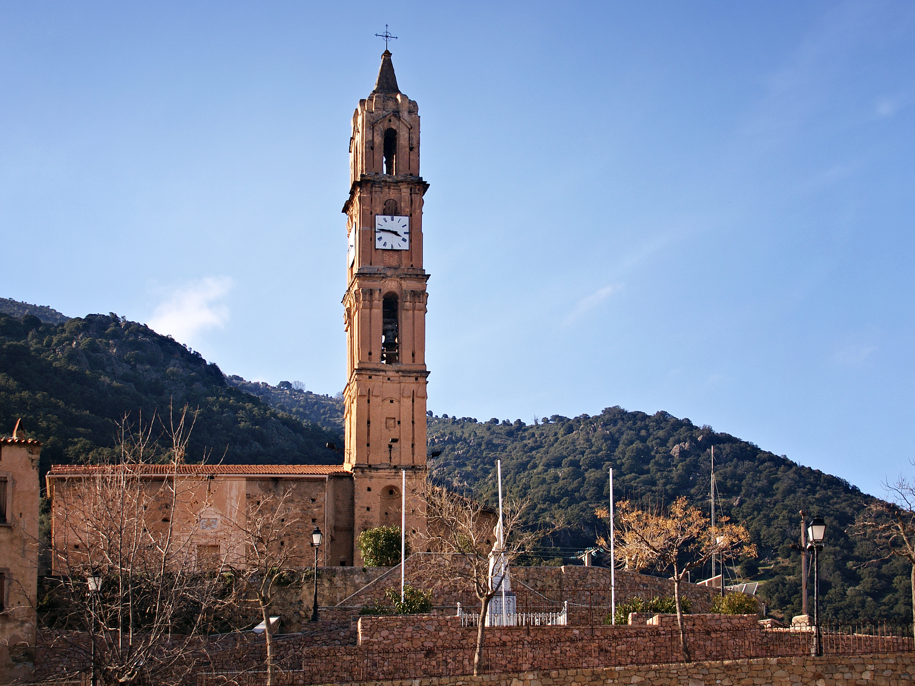 Moltifao - Eglise de l'Annunziata et Monument-aux-morts